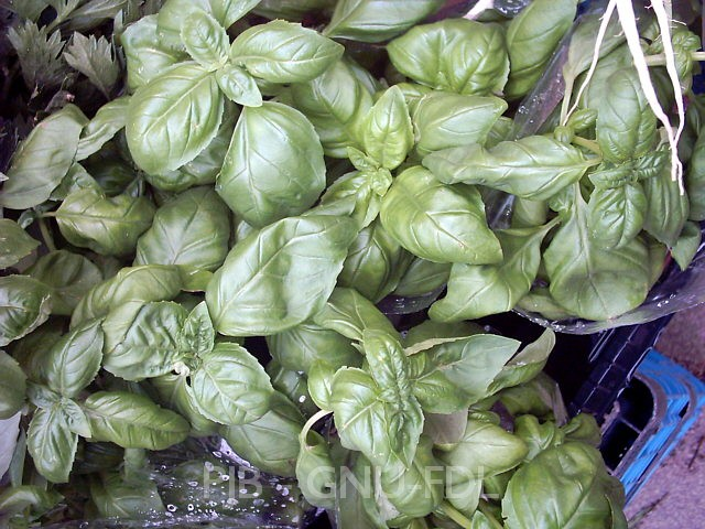 Basilikum - Ocimum basilicum - Marktware Bildautor: Peter Bubenik - Aufnahmedatum: 21.07.2004 - Lizenz: GNU-FDL